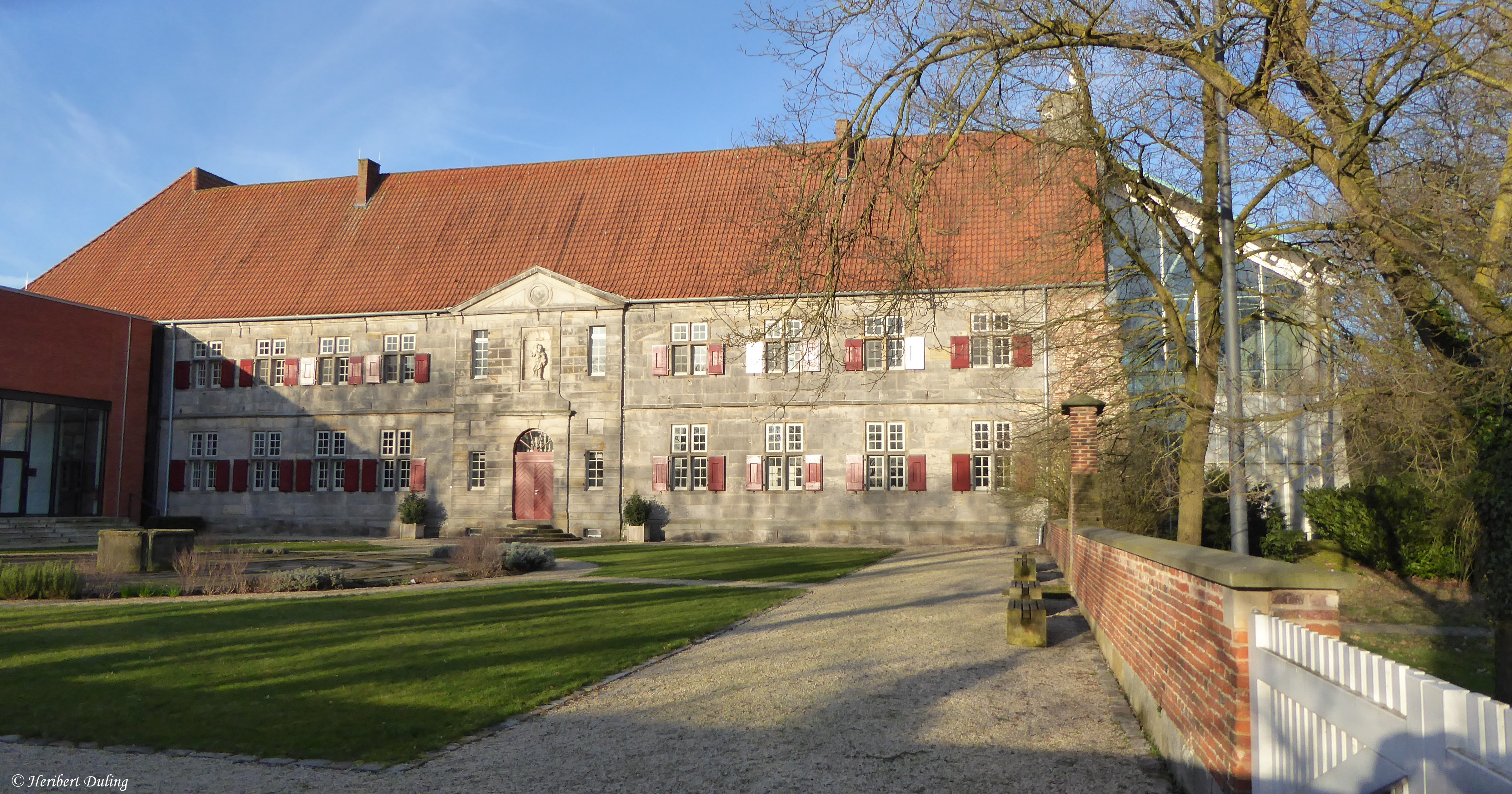 Ostflügel mit Labyrinth-Garten